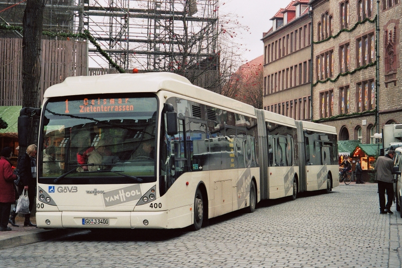 Doppelgelenkbus der Göttinger Verkehrsbetriebe an der Haltestelle Markt